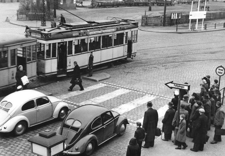 Zentralbild-Schmidtke Me-Qu. 22.3.52. Erster Fussgängerschutzweg in Berlin. Die Berliner Verkehrspolizei hat in Niederschöneweide zur Sicherung des Fussgängerverkehrs eine Neuerung geschaffen. Über den Fahrdamm führt ein "Fussgängerschutzweg", auf dem die Fussgänger das Vorrecht haben. Der Schutzweg ist kenntlich durch je zwei parallel laufende weisse Streifen quer zur Fahrbahn und durch rot-weisse Leuchtpfeile mit der Aufschrift "Fussgänger". Die dort gesammelten Erfahrungen sollen richtungsgebend sein für die Errichtung weiterer derartiger Anlagen in anderen verkehrsreichen Strassen. UBz: Der erste Fussgängerschutzweg vor dem Ausgang des S-Bahnhofs Schönweide, vor dem sich leider bisher viele Verkehrsunfälle ereigneten.